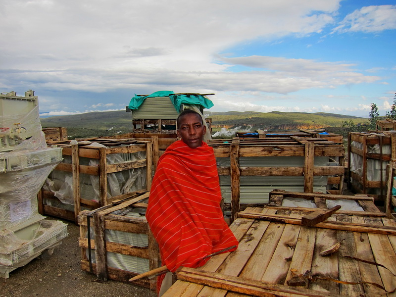 Maasai at Olkaria, Kenya